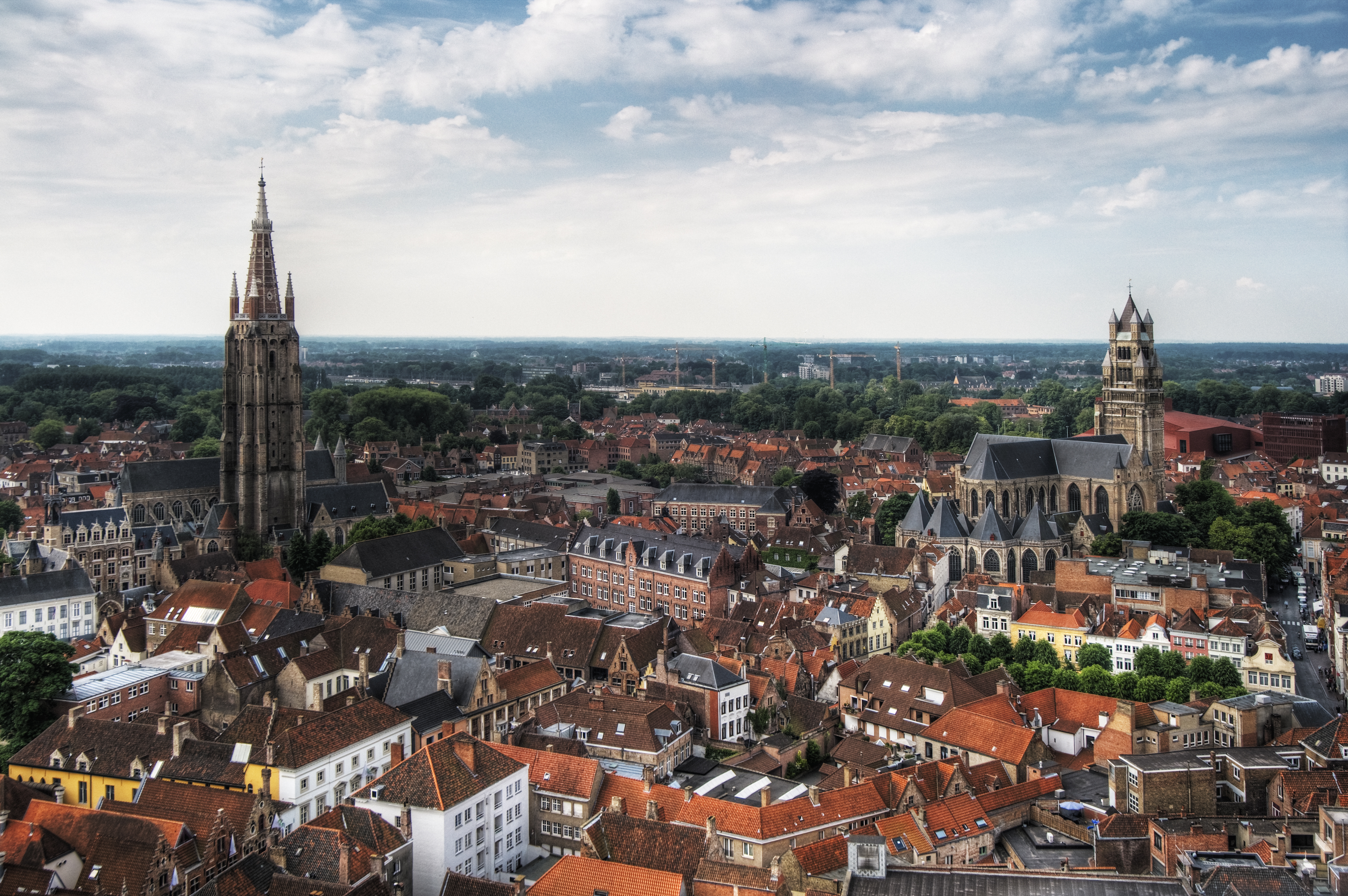 Brugge is d'oofdstad en de grotste stad van de Vlamsche provinsje West-Vloandern en van 't arroundissement Brugge.